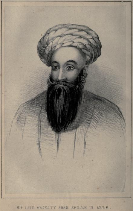 شاه شجاع د افغانستان د لوی پاچا احمد شاه بابا لمسی او د تېمور شاه ځوی ؤ.